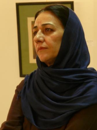 site shakhsiye ishon ra inja bebinid